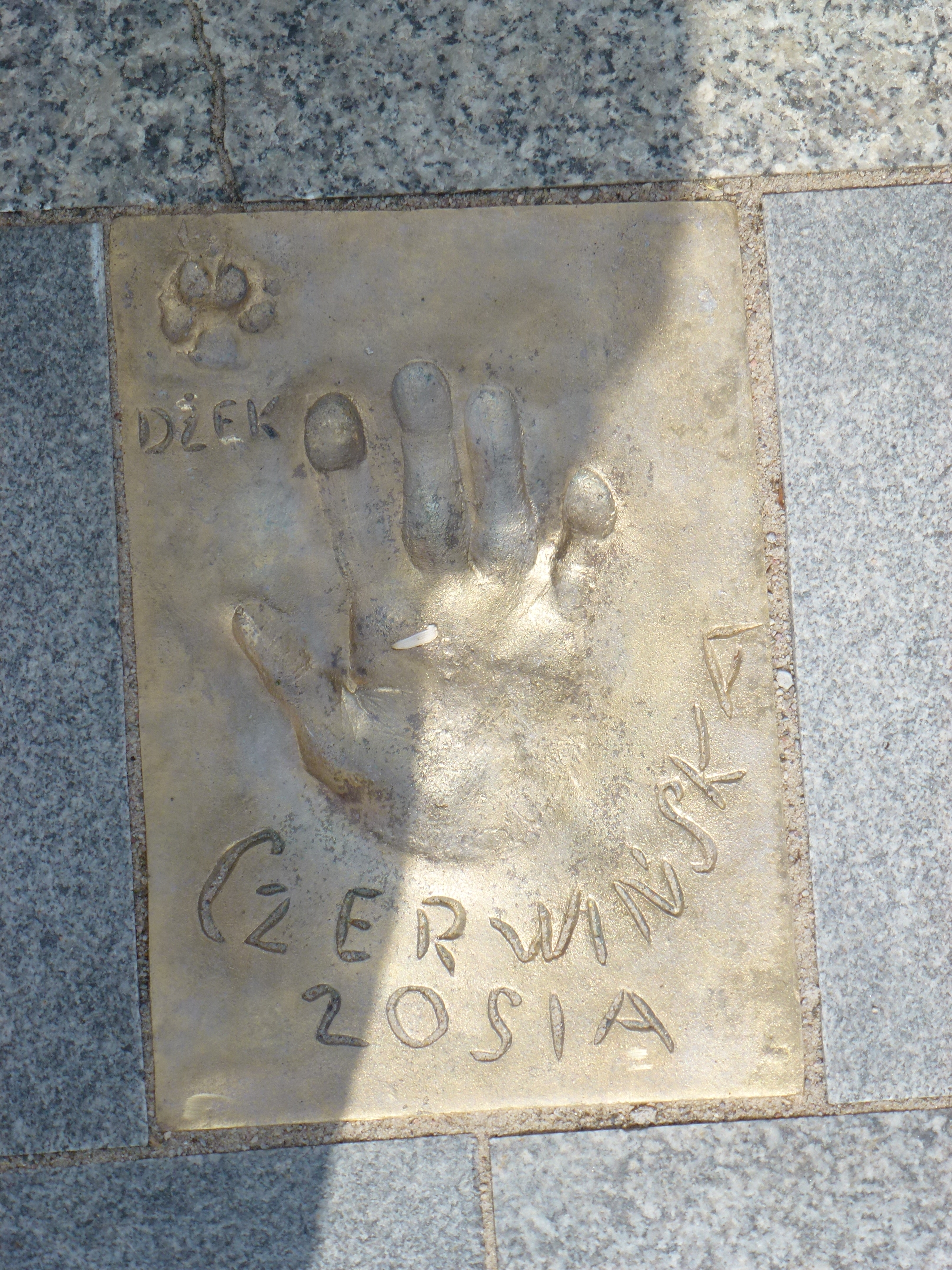 Odcisk gwiazdy na ul. Aleji Gwiazd w Międzyzdrojach woj. zachodniopomorskie pow. kamieński